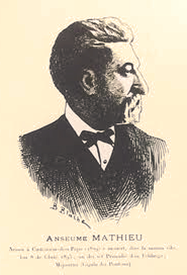 Anselme Mathieu, co-fondateur du Félibrige avec Frédéric Mistral